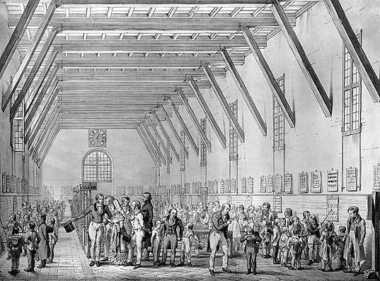 Confalonieri e Silvio Pellico alla applicazione del metodo Lancaster-Bell di mutuo insegnamento